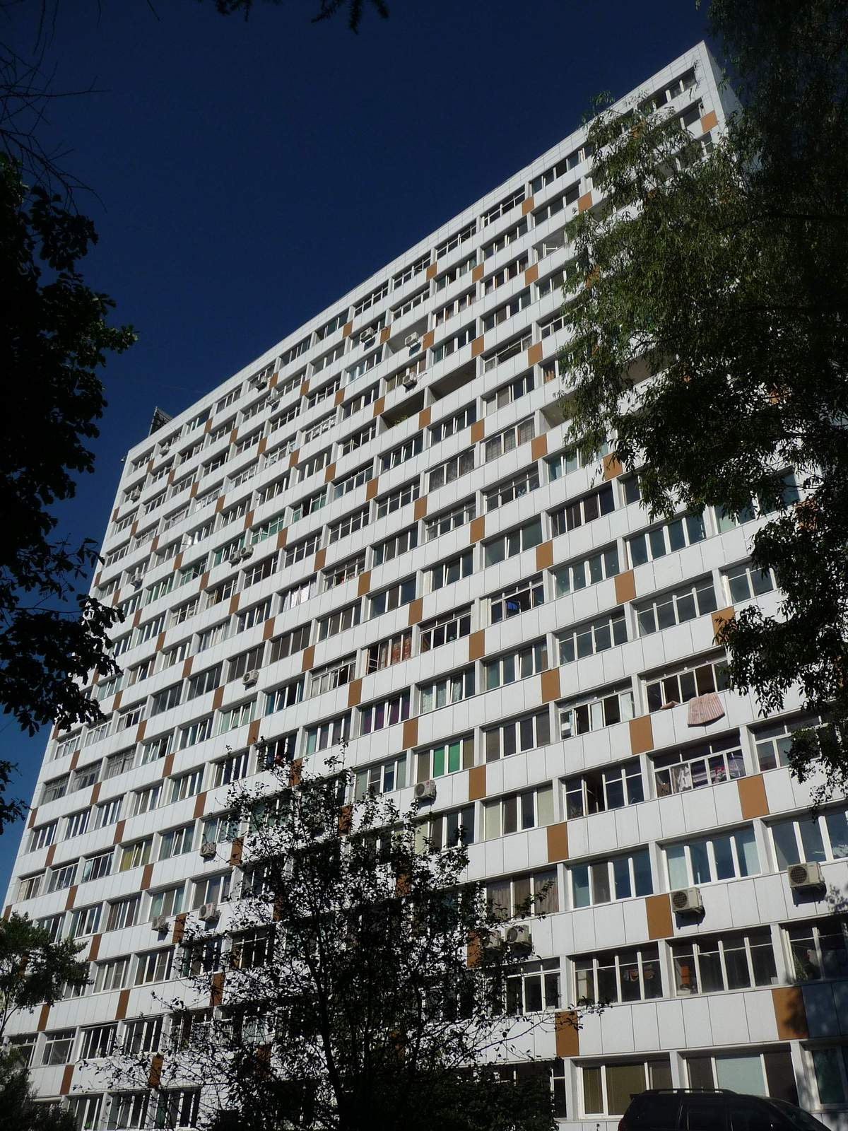 Первый 16-этажный дом во Владивостоке (Русская, 48). Съёмка 2013-08-24.